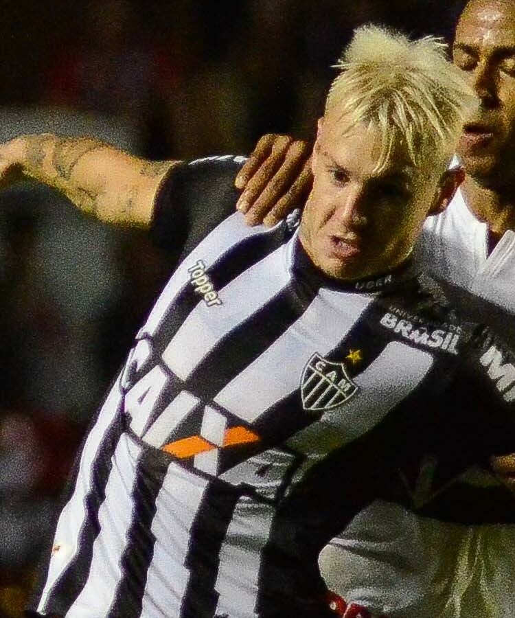 Roger Guedes em partida de 2018 do Atlético Mineiro